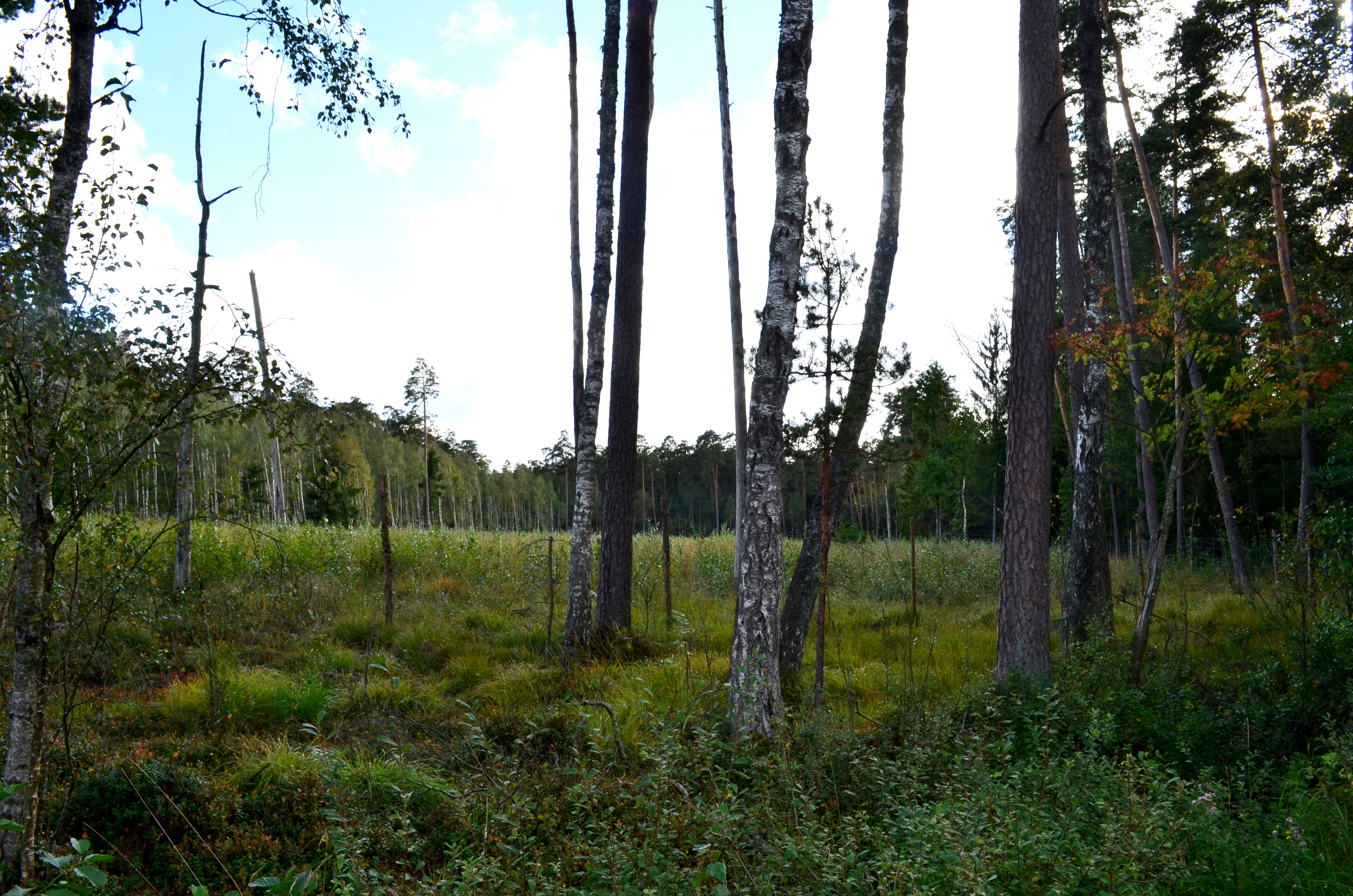 Kintų miškas, Šilutės raj.